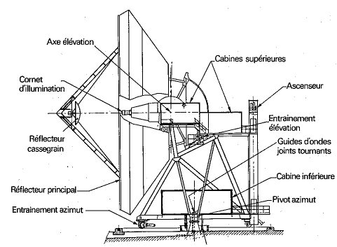 Plan PB3